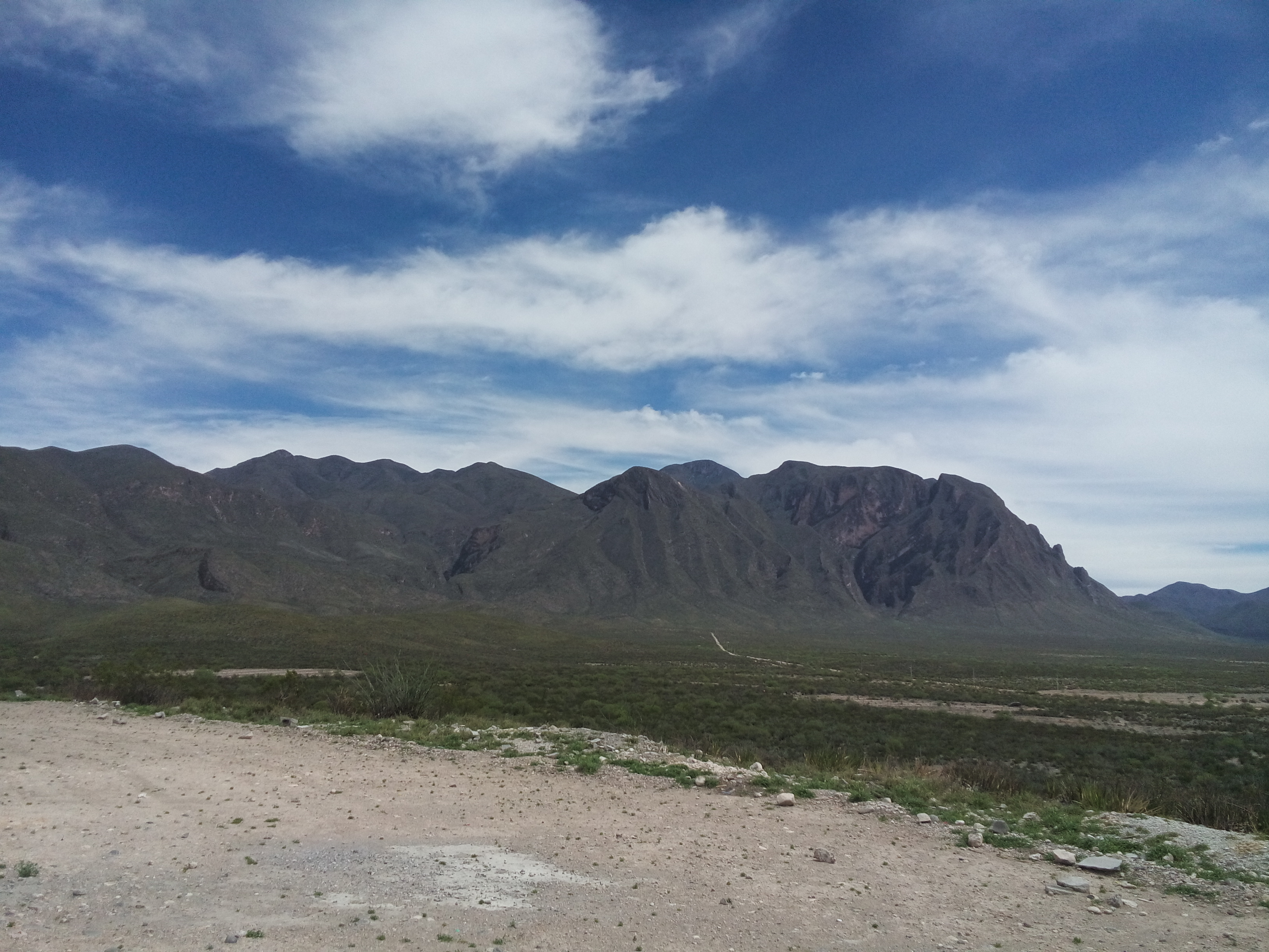 El Centinela